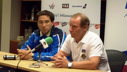 Берти Фогст во время пресс-конференции